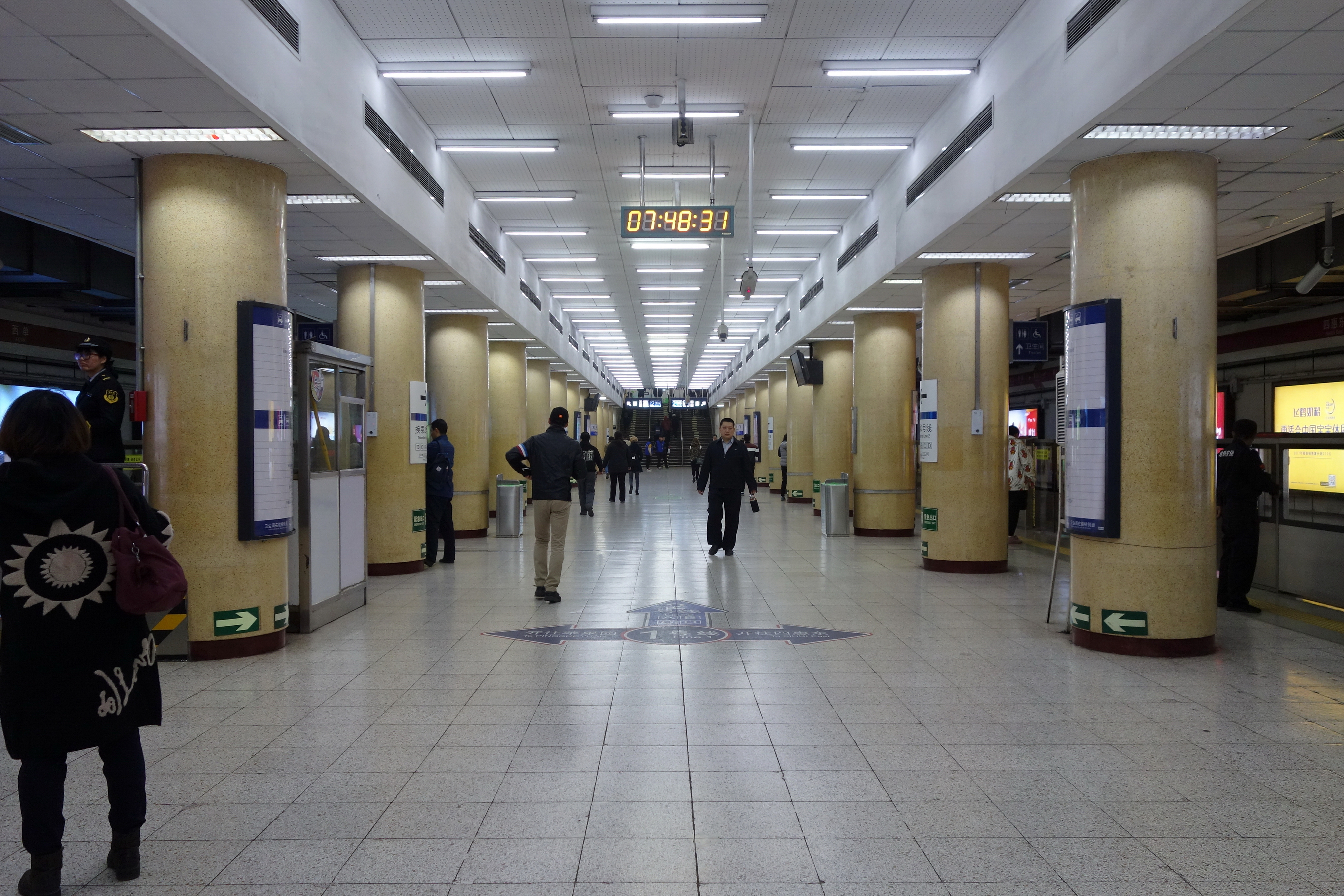 北京地铁1号线复兴门站岛式站台。